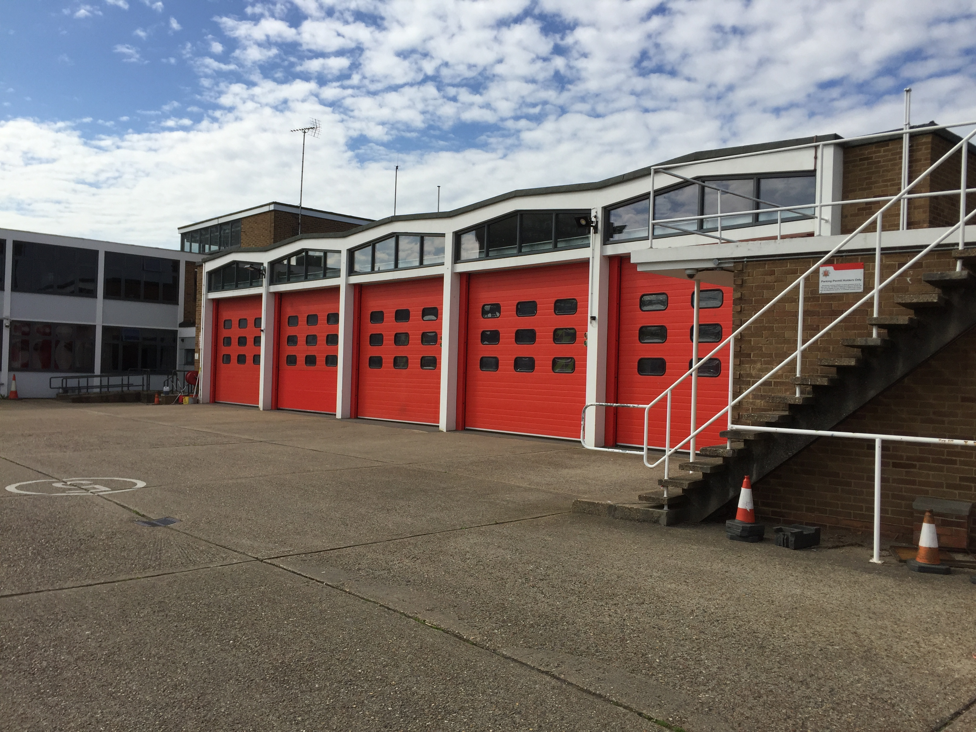 Basildon Fire Station in Essex.